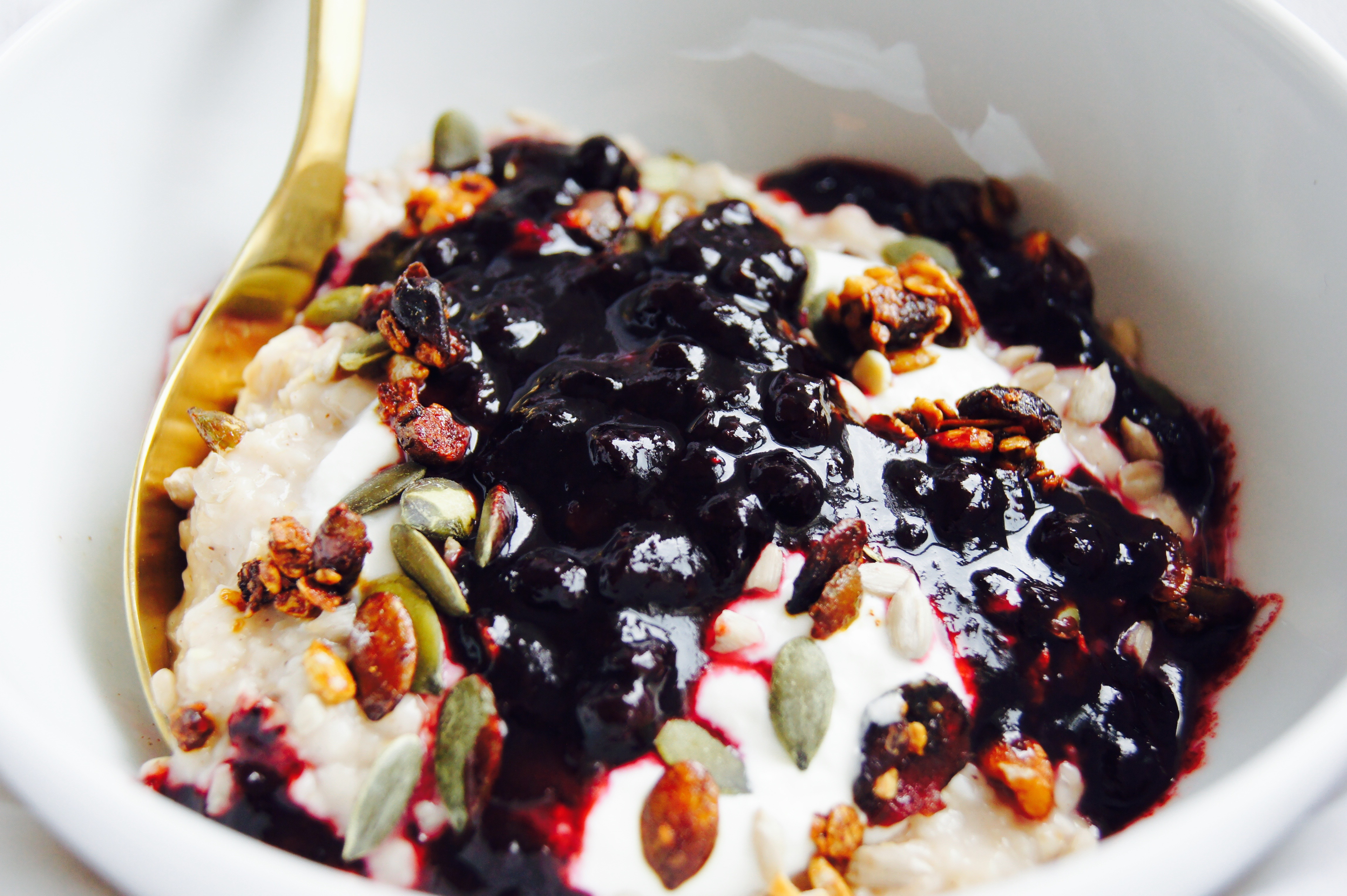 Havregrøt kan serveres på uttallige måter. Havregrøten på bildet er servert med cottage cheese, yoghurt, gresskarkjerner, solsikkekjerner, rosiner, mandler og blåbærsyltetøy